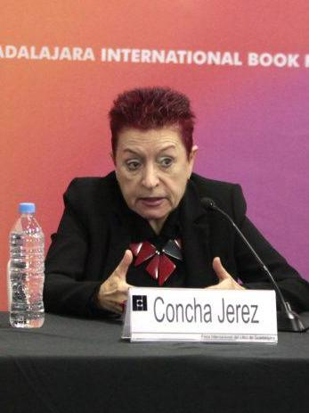 Los contenidos educativos en el aula, los nuevos modelos del negocio editorial y algunas experiencias de promoción lectora se han sucedido en el Pabellón de Madrid a lo largo de la cuarta jornada de la Feria Internacional del Libro de Guadalajara. Entre ellas, el espacio destinado a valorar la eclosión que actualmente vive en nuestro país el cómic y el debate sobre la huella que está dejando en el mundo de la cultura el movimiento de los indignados. Este último corrió a cargo de Fernando Castro, comisario de Pongamos que hablo de Madrid; el filósofo Ernesto Castro y, el editor Blas Garzón (Traficantes de sueños). Los tres analizaron el origen y momento actual de dicho movimiento, estableciendo los paralelismos con otros similares en el resto del mundo y en especial con el movimiento YoSoy 132 mexicano.